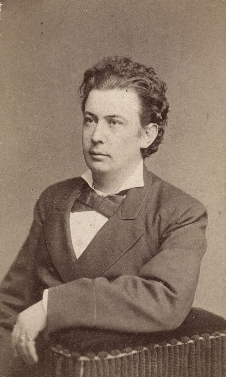 Skuespiller Albert Vilhelm Bøgh